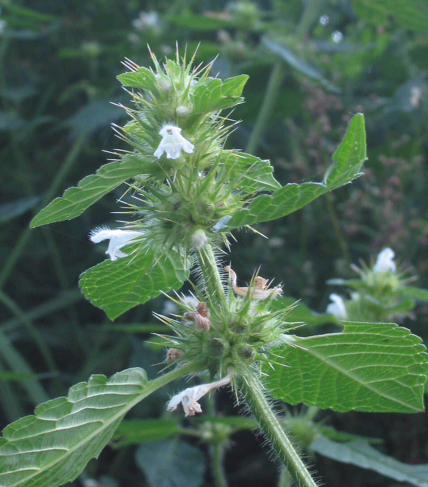 (nl: Gewone hennepnetel bloem) Galeopsis tetrahit flower